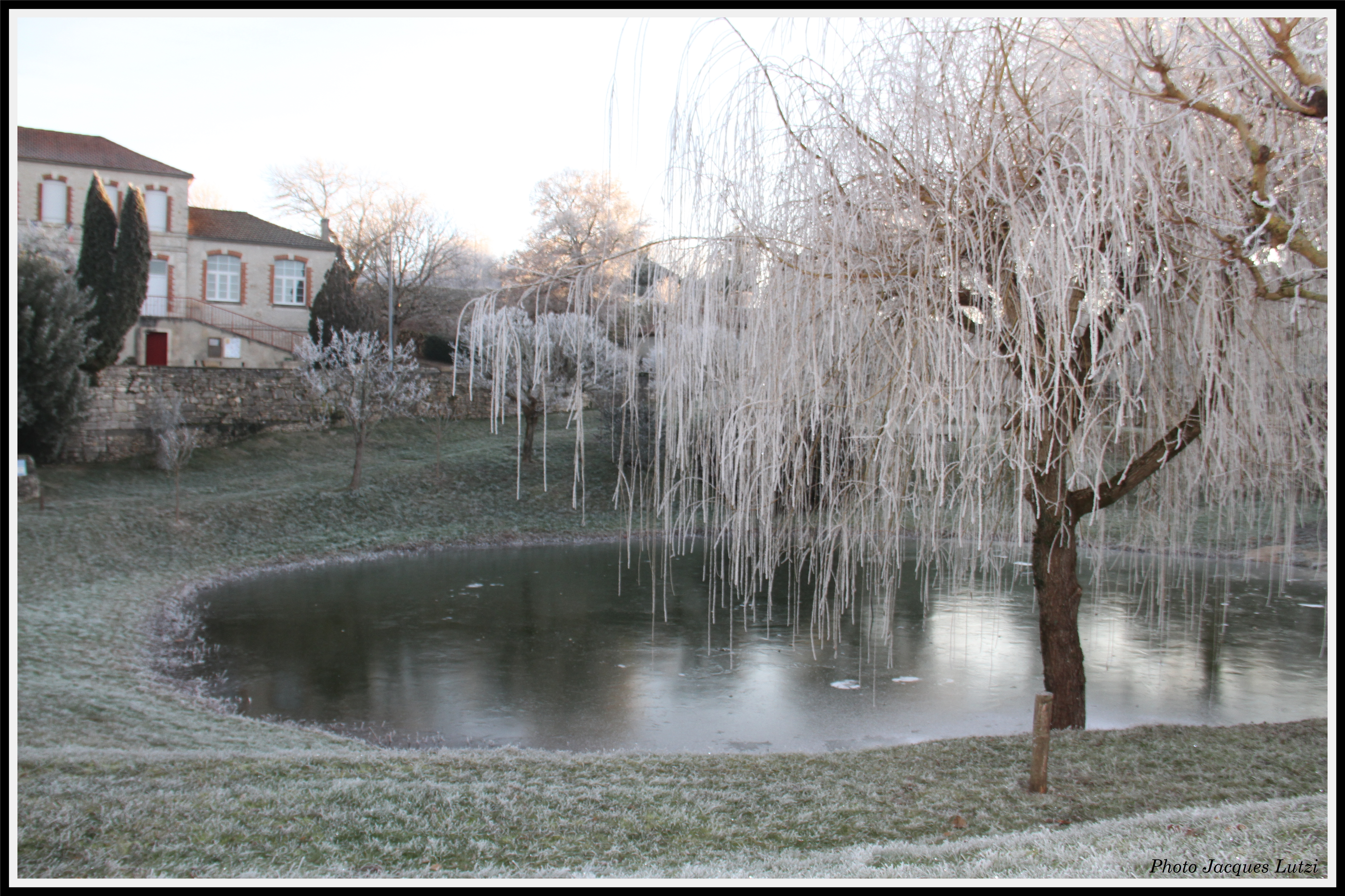 Le lac et la mairie.